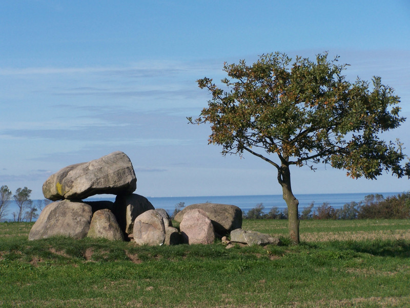 Hünengrab bei Rerik